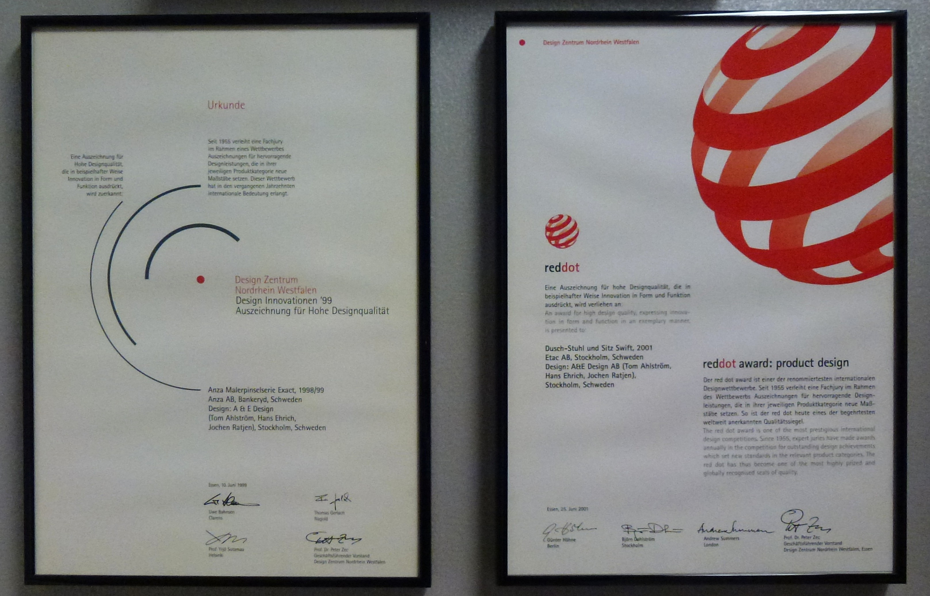 A&E Red Dot Diplom